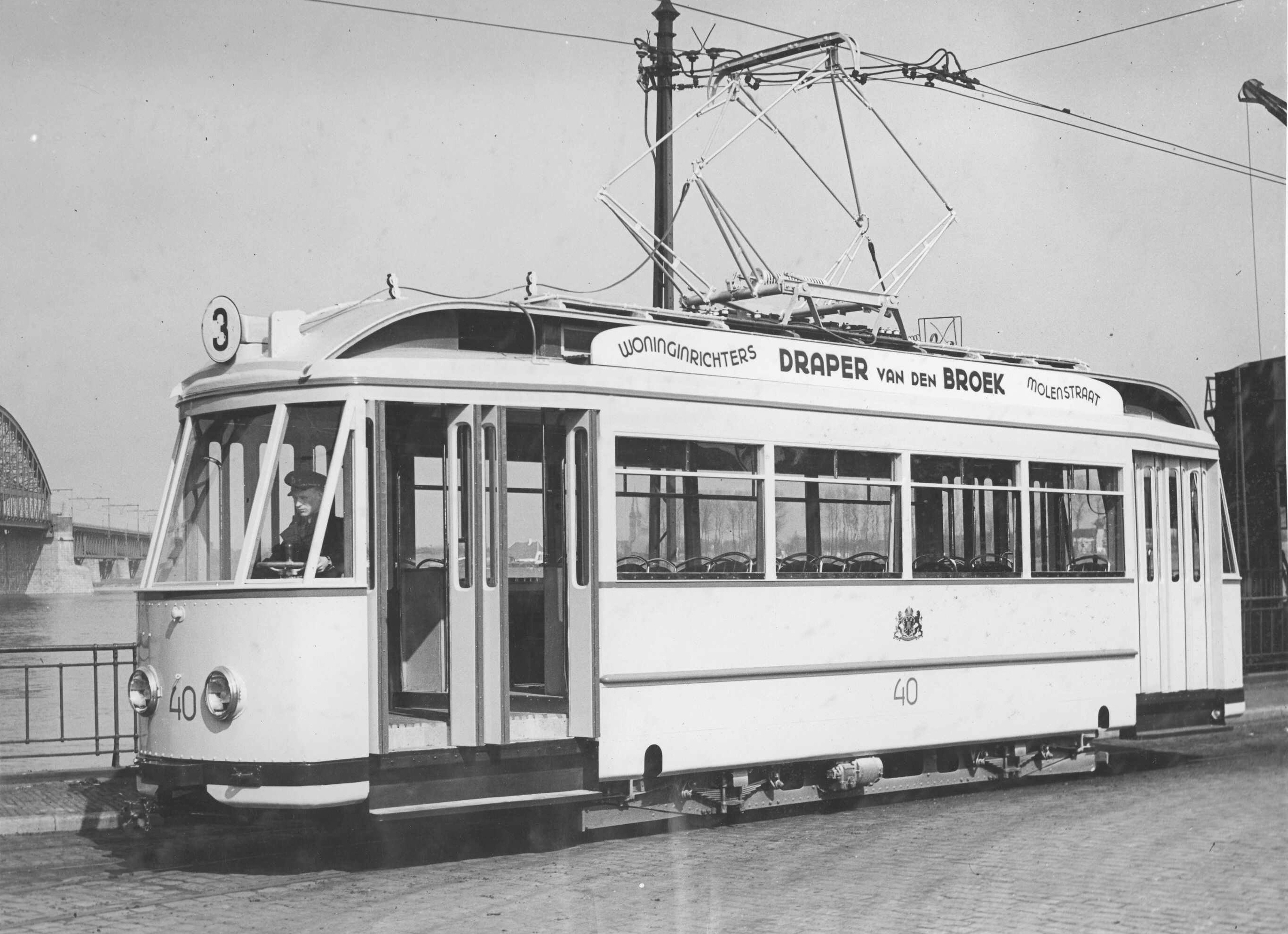 Tramstel 40 bij vertrek uit de remise, links de spoorbrug